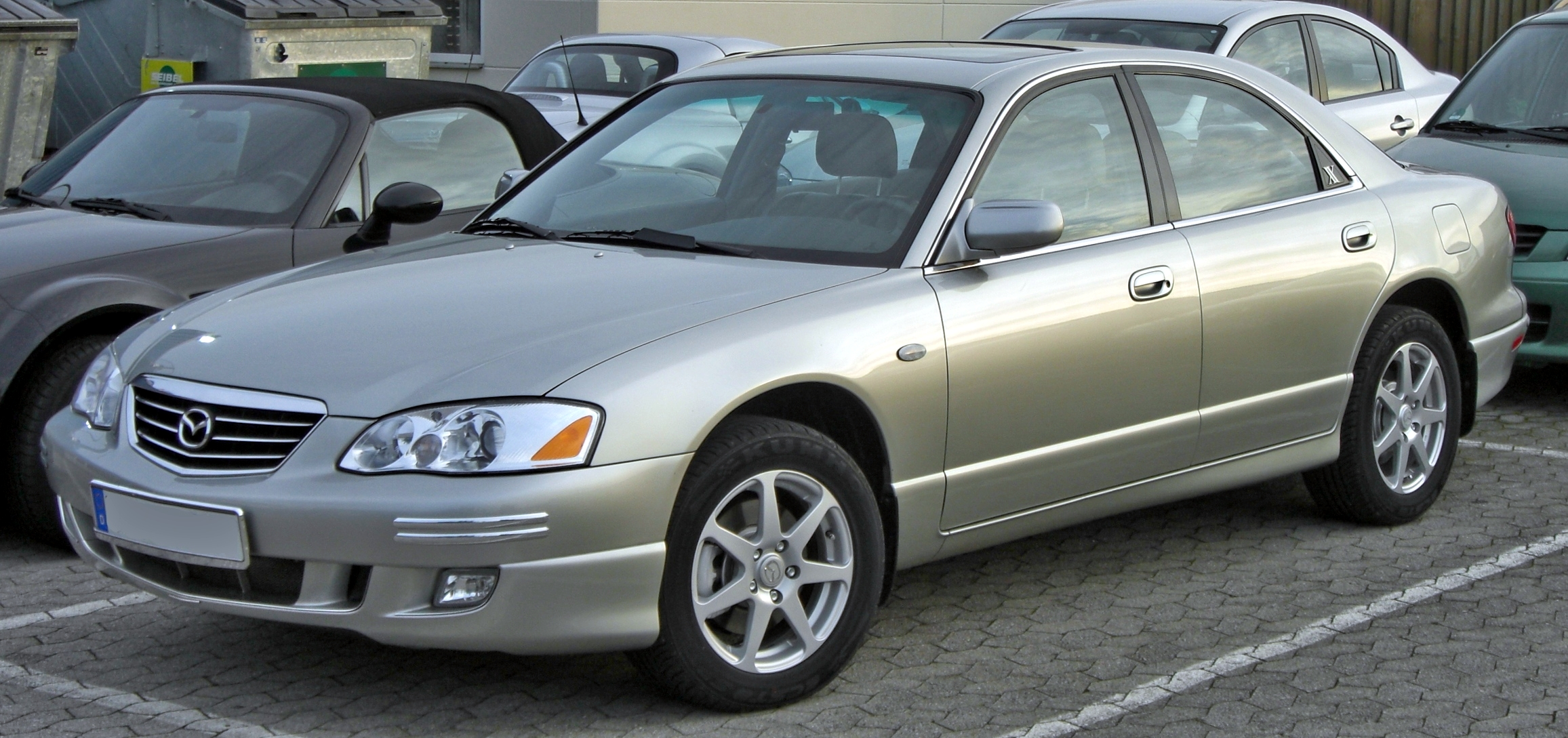 Mazda Xedos 9